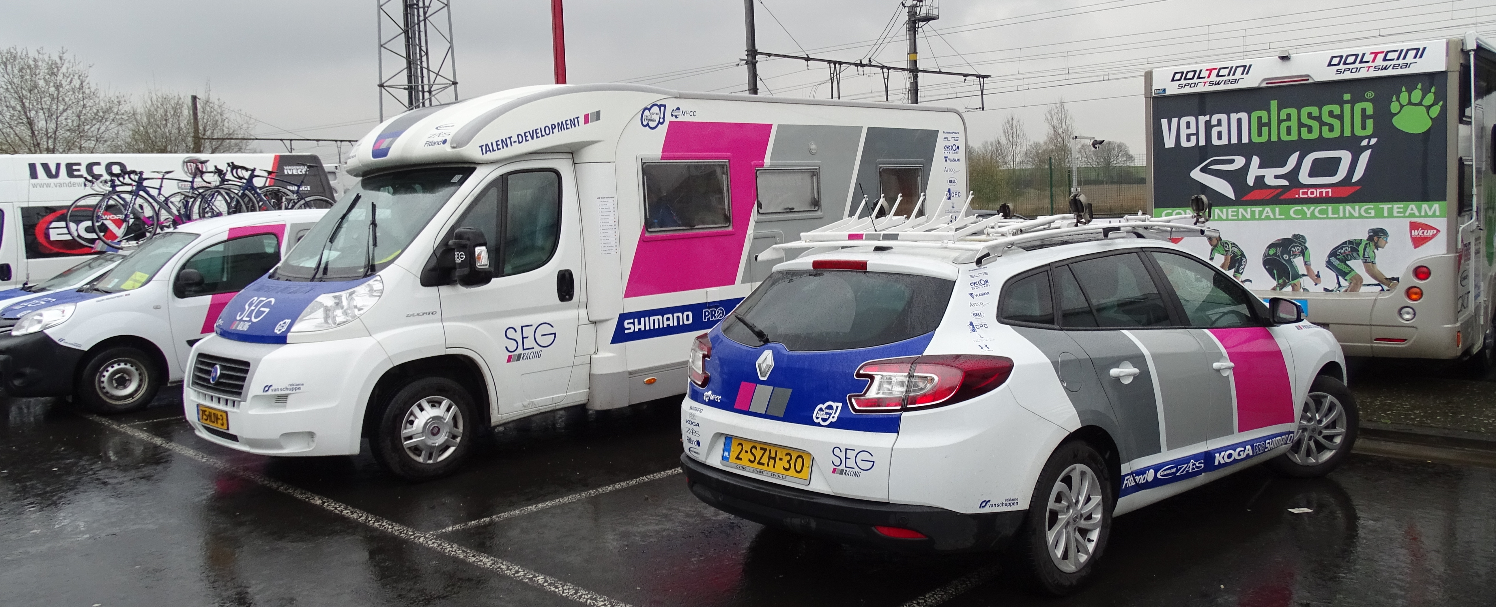 Triptyque des Monts et Châteaux 2015 Depicted team: SEG Racing